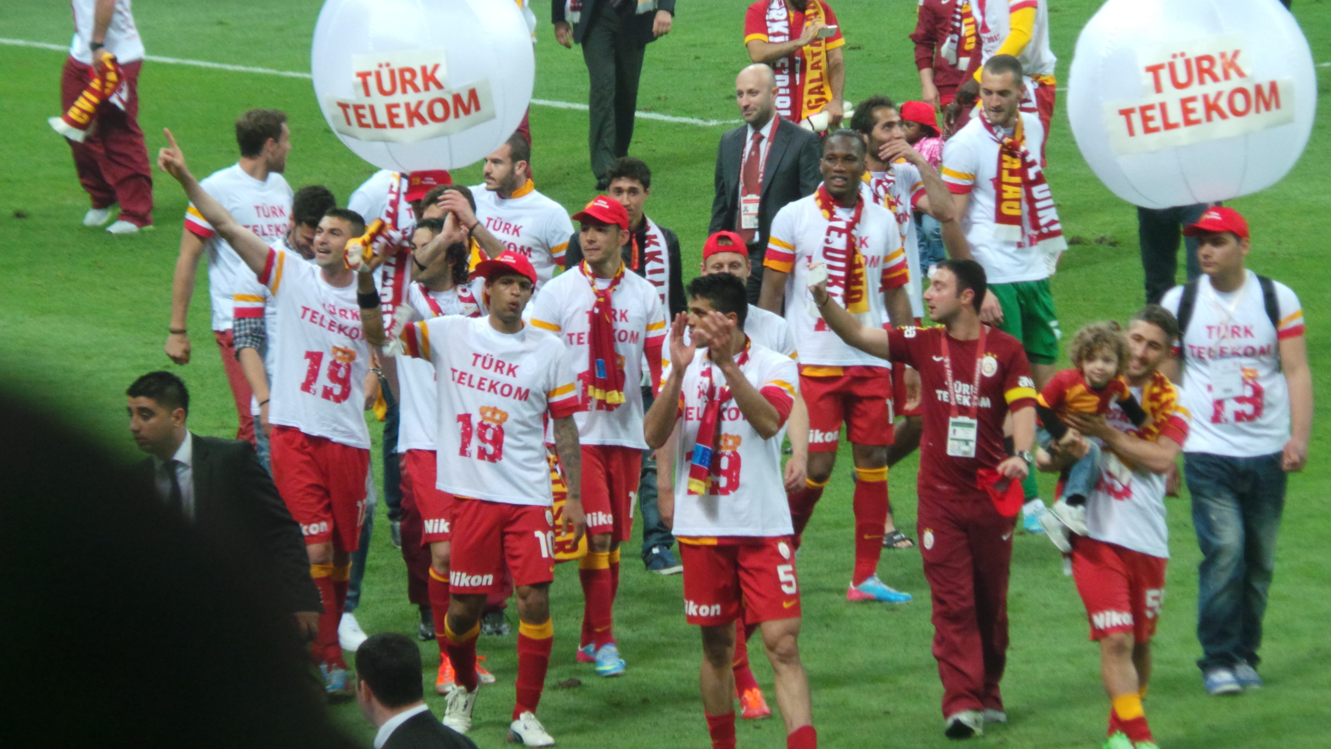 Galatasaray- Sivasspor maçın sonrasından